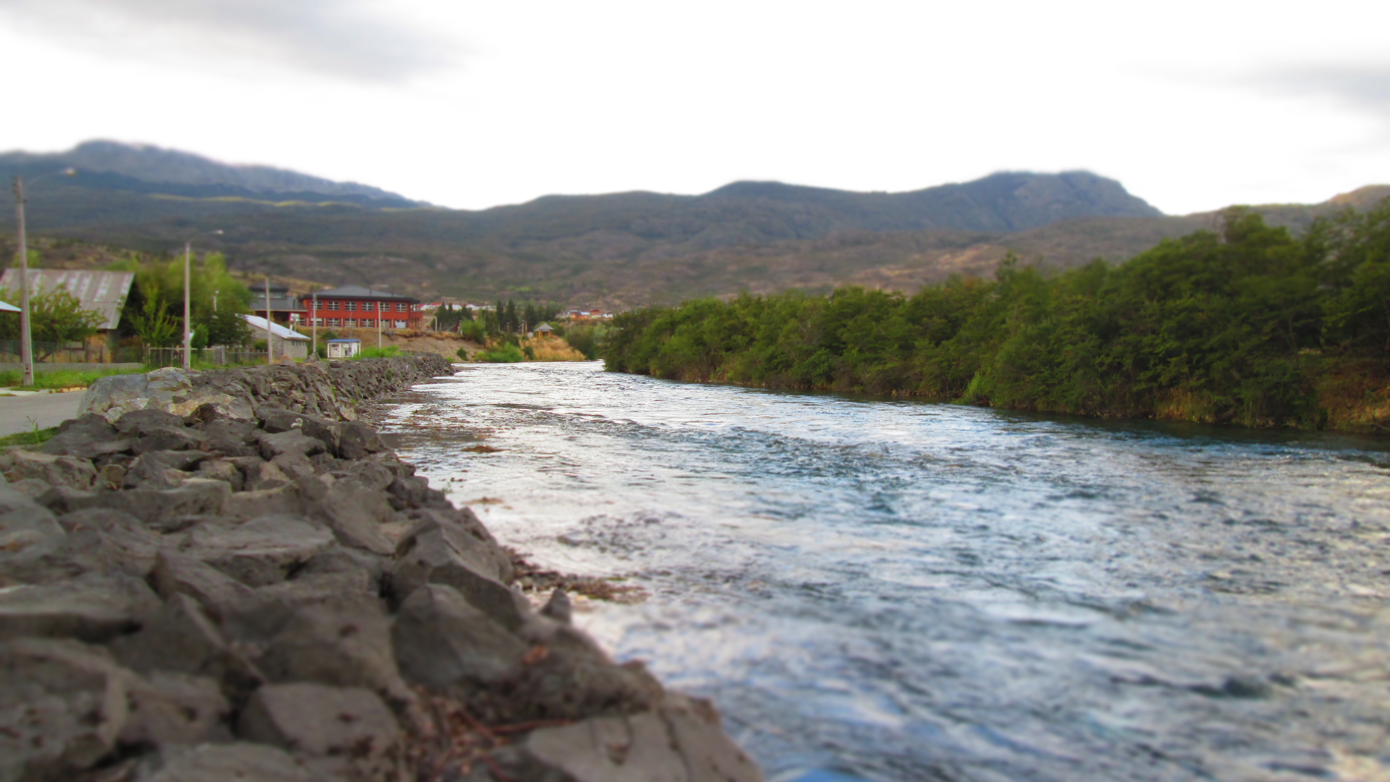 Río Cochrane pasando por la ciudad de Cochrane, región de Aysén.